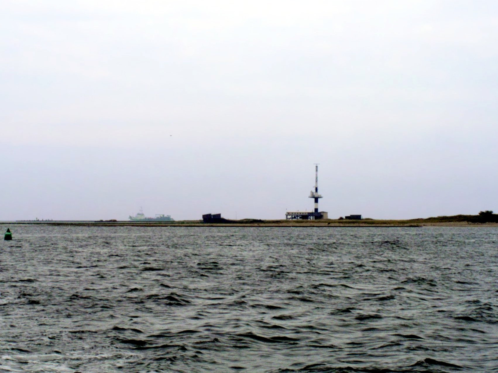 Minsener Oog